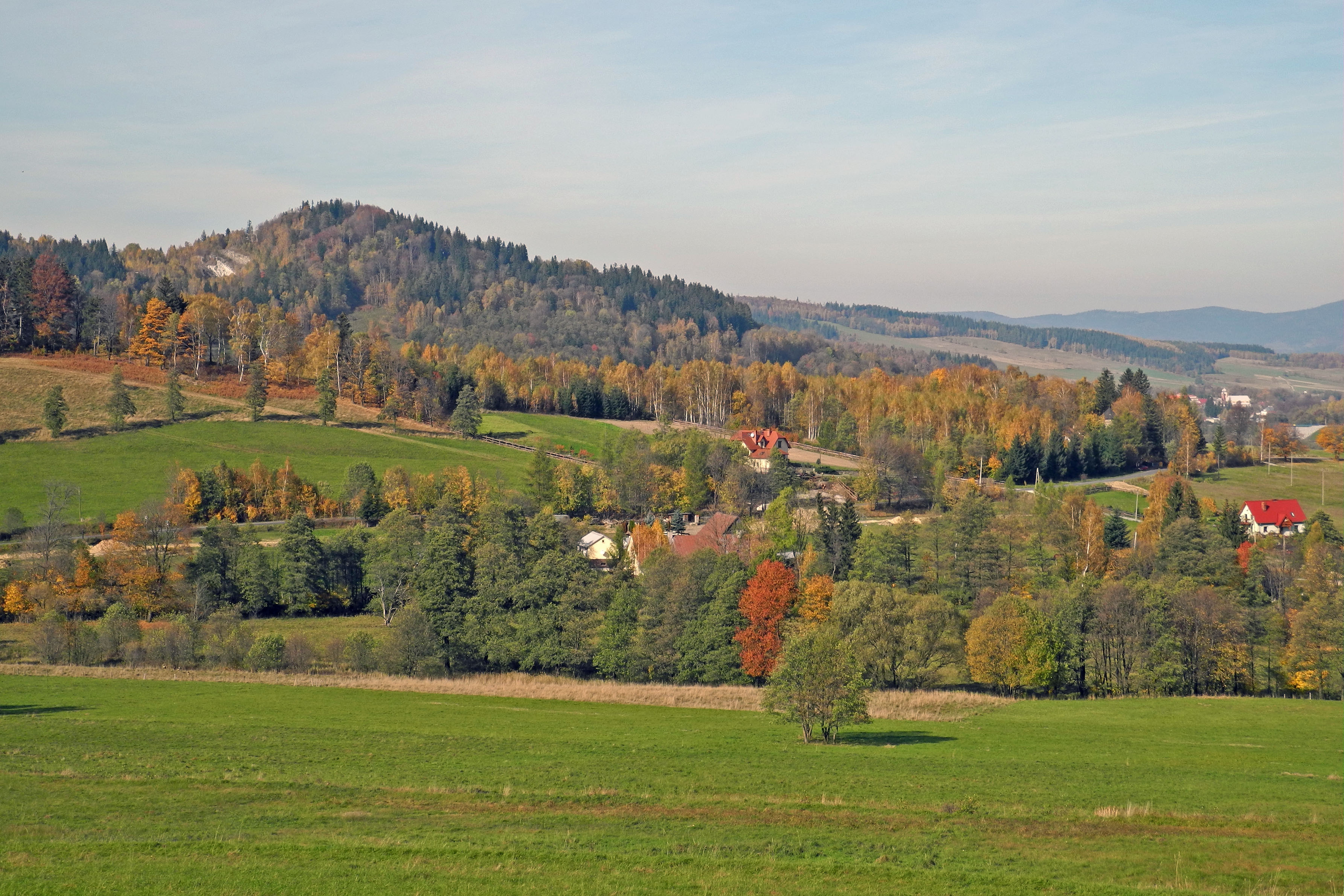 Blick zum Krzyżnik – Kreuzberg (710 m) oberhalb von Kletno (Klessengrund) im Glatzer Bergland